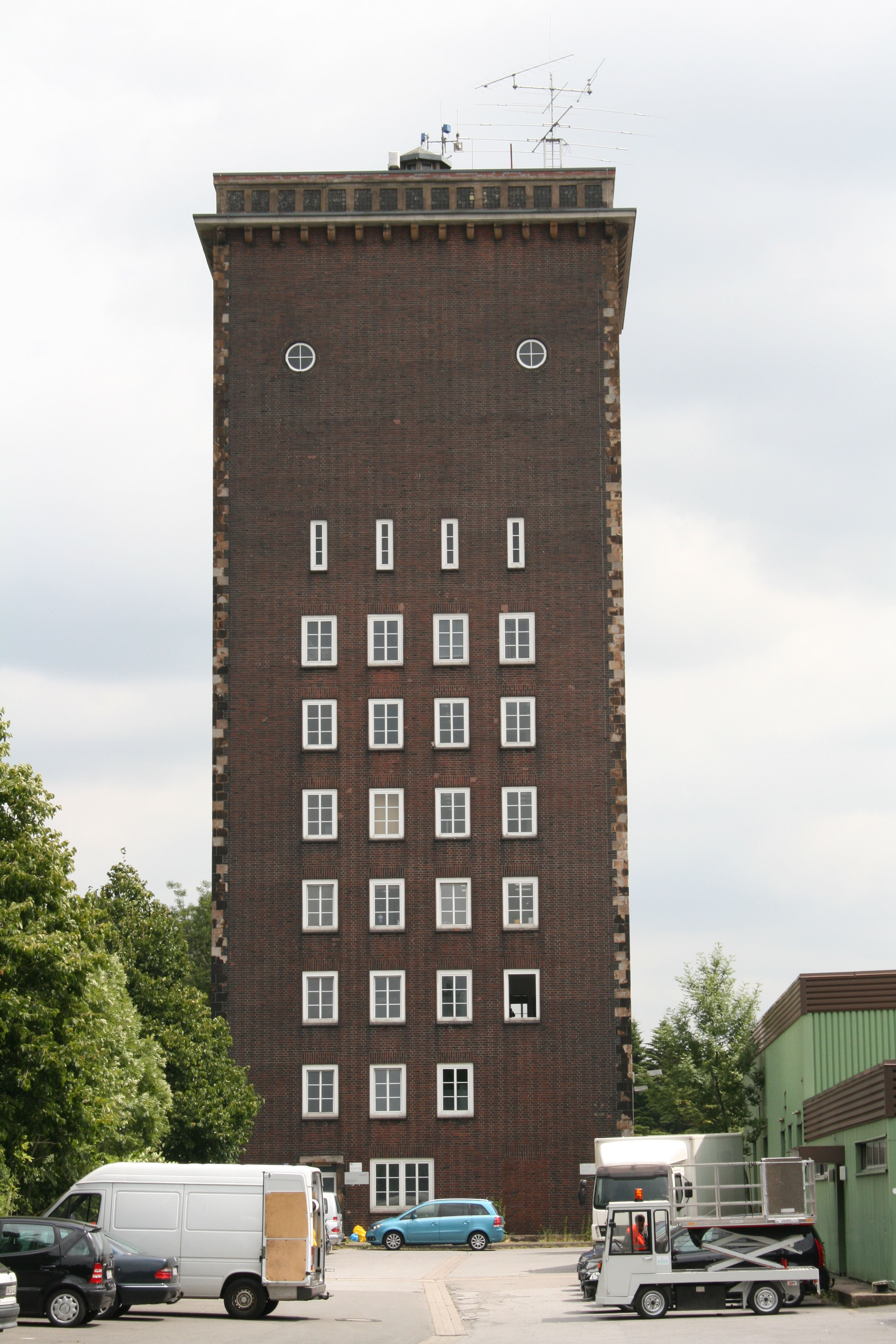 Betriebswerk Dortmund-Betriebsbahnhof, der Wasserturm von 1942